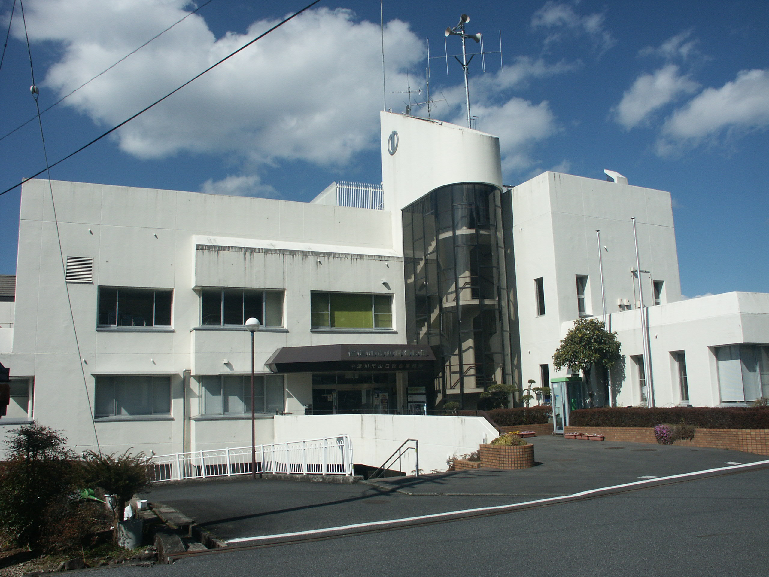 中津川市役所山口総合事務所・山口公民館